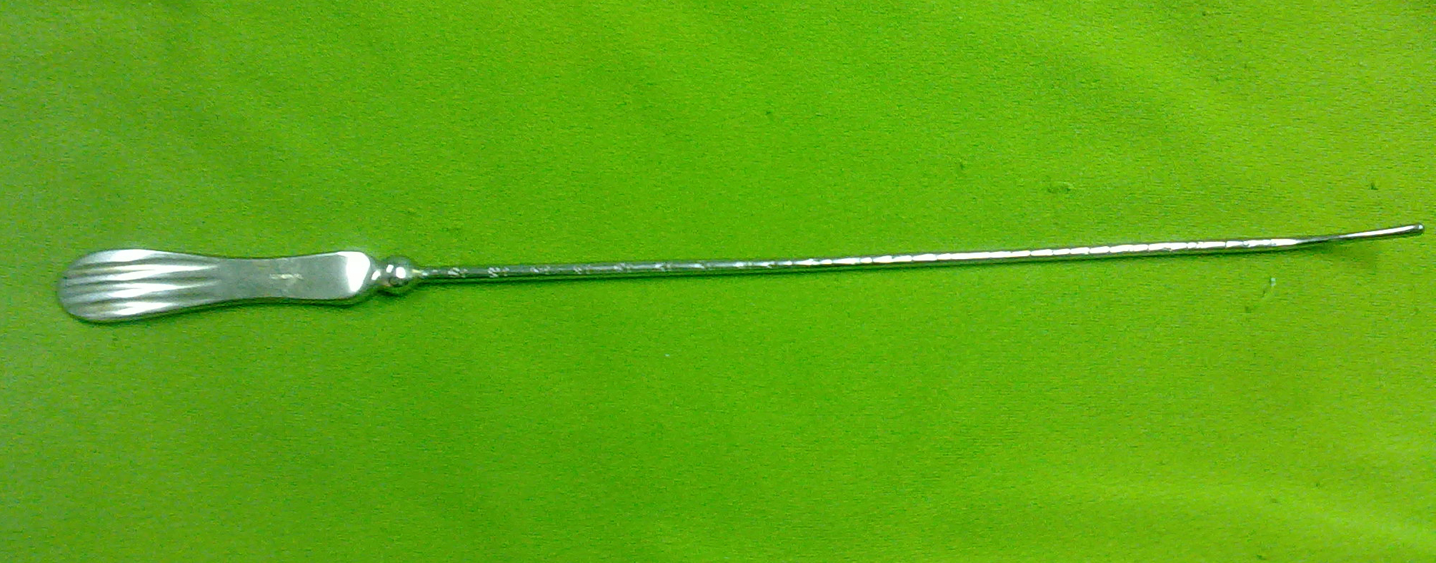 هیسترومتر : نام دیگر آن سوند رحمی است . این وسیله مدرج بوده و برای اندازه‌گیری عمق رحم از آن استفاده می‌کنند .